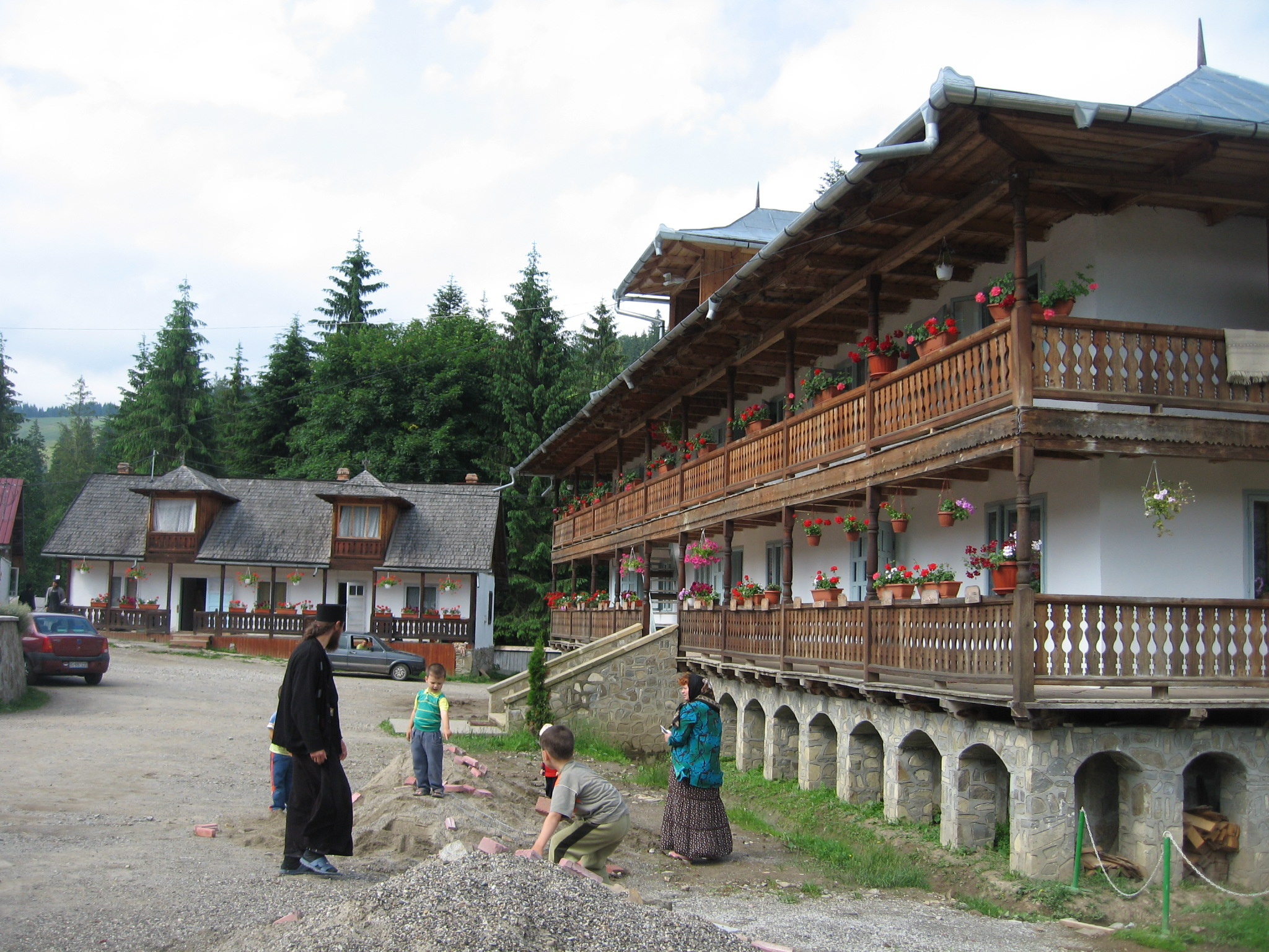 Mănăstirea Petru Vodă